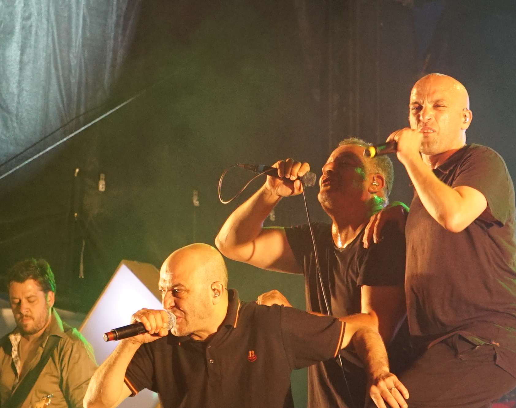 lors de Un été dans l'Aisne 2015 à Laon.